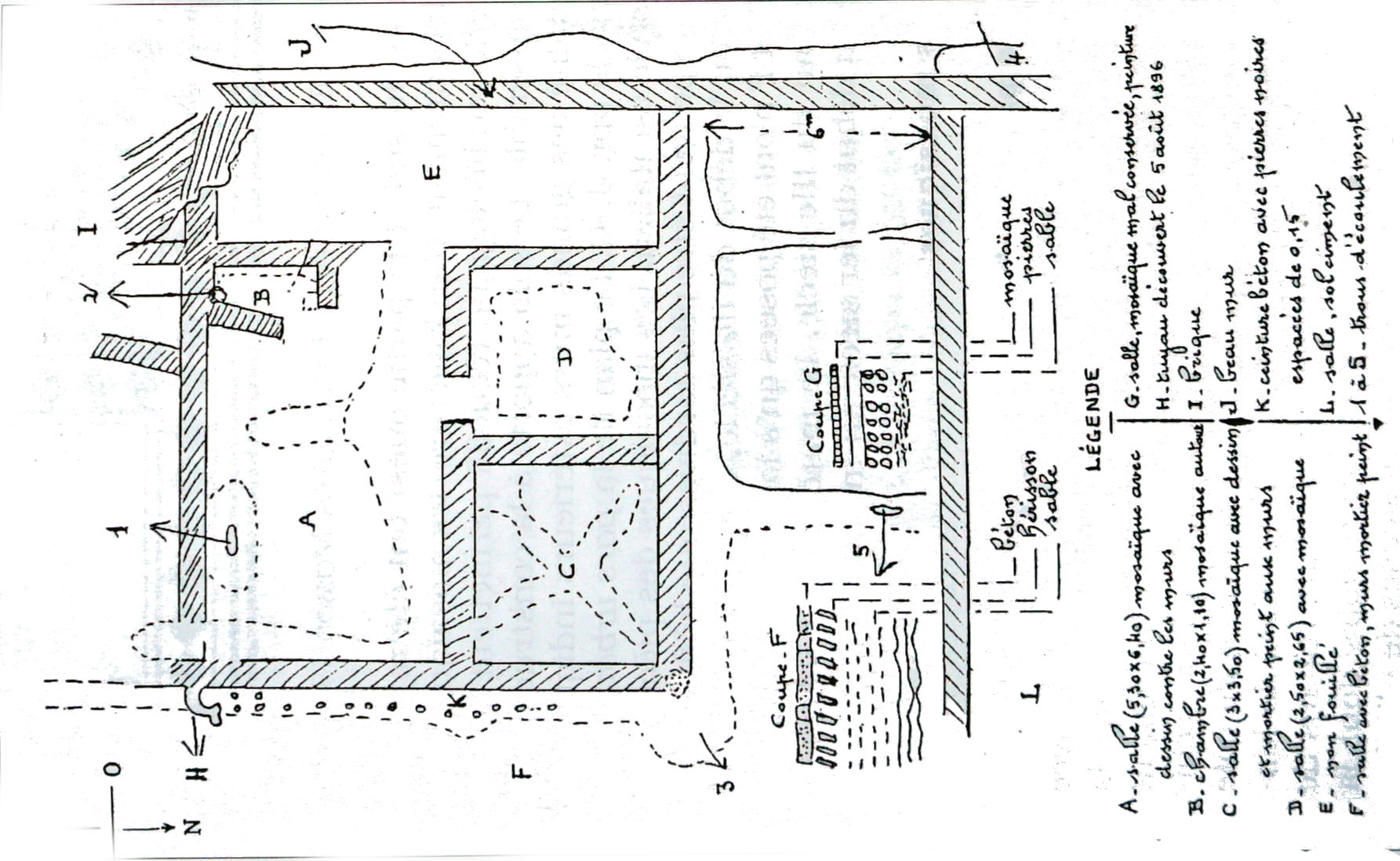 vue de cf. titre